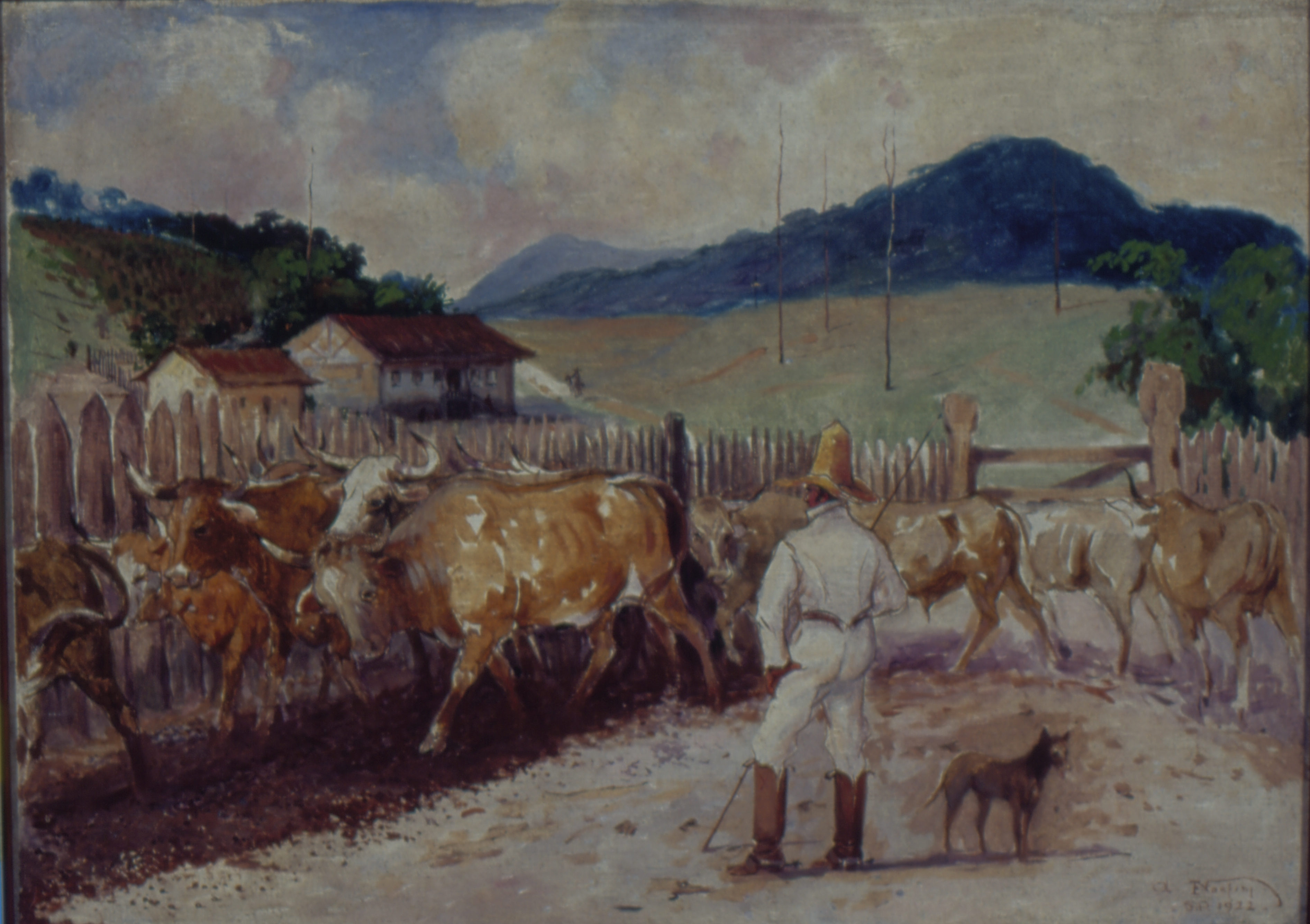 Obra que integra o acervo do Museu Paulista da USP. Coleção Fundo Museu Paulista - FMP